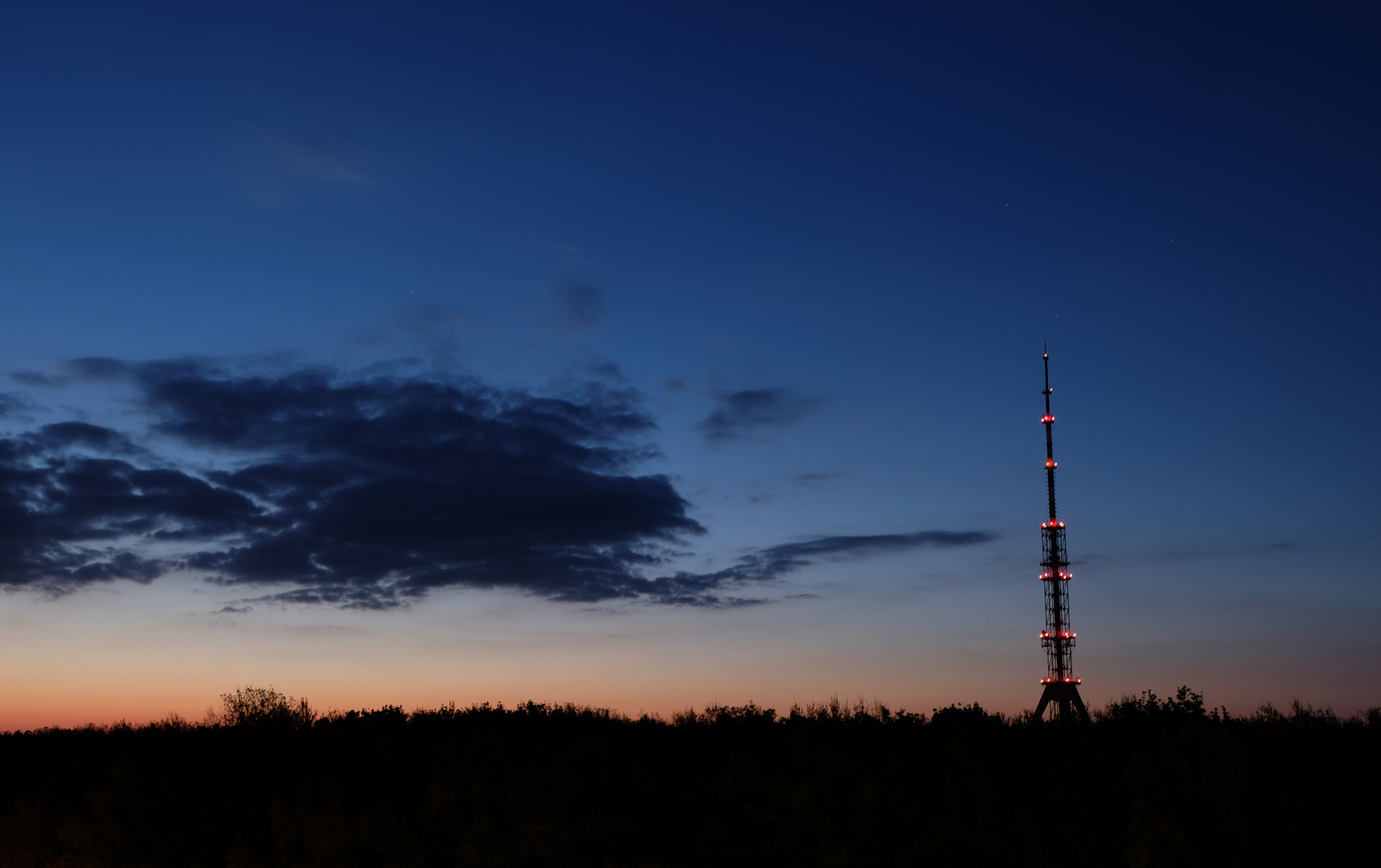 Харьковская телебашня